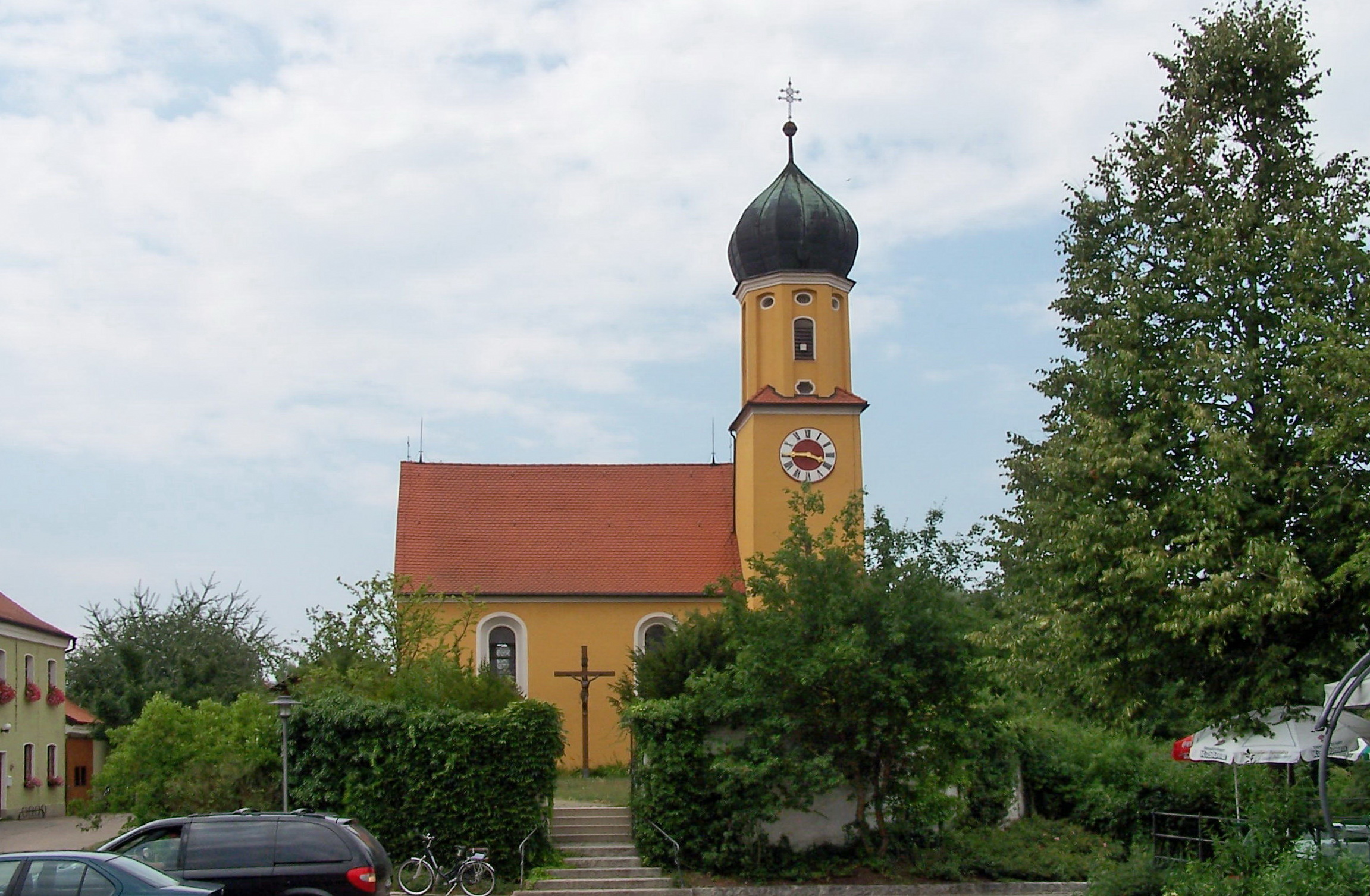 Barbing, Sarching, Kirchplatz 1. Katholische Pfarrkirche Mariä Himmelfahrt, Saalbau mit eingezogenem Chor, Flankenturm mit Zwiebelhaube, Vorzeichen, 1762 unter Verwendung älterer Teile, spätgotisch und 1628; Friedhofsmauer, 17./18. Jahrhundert.